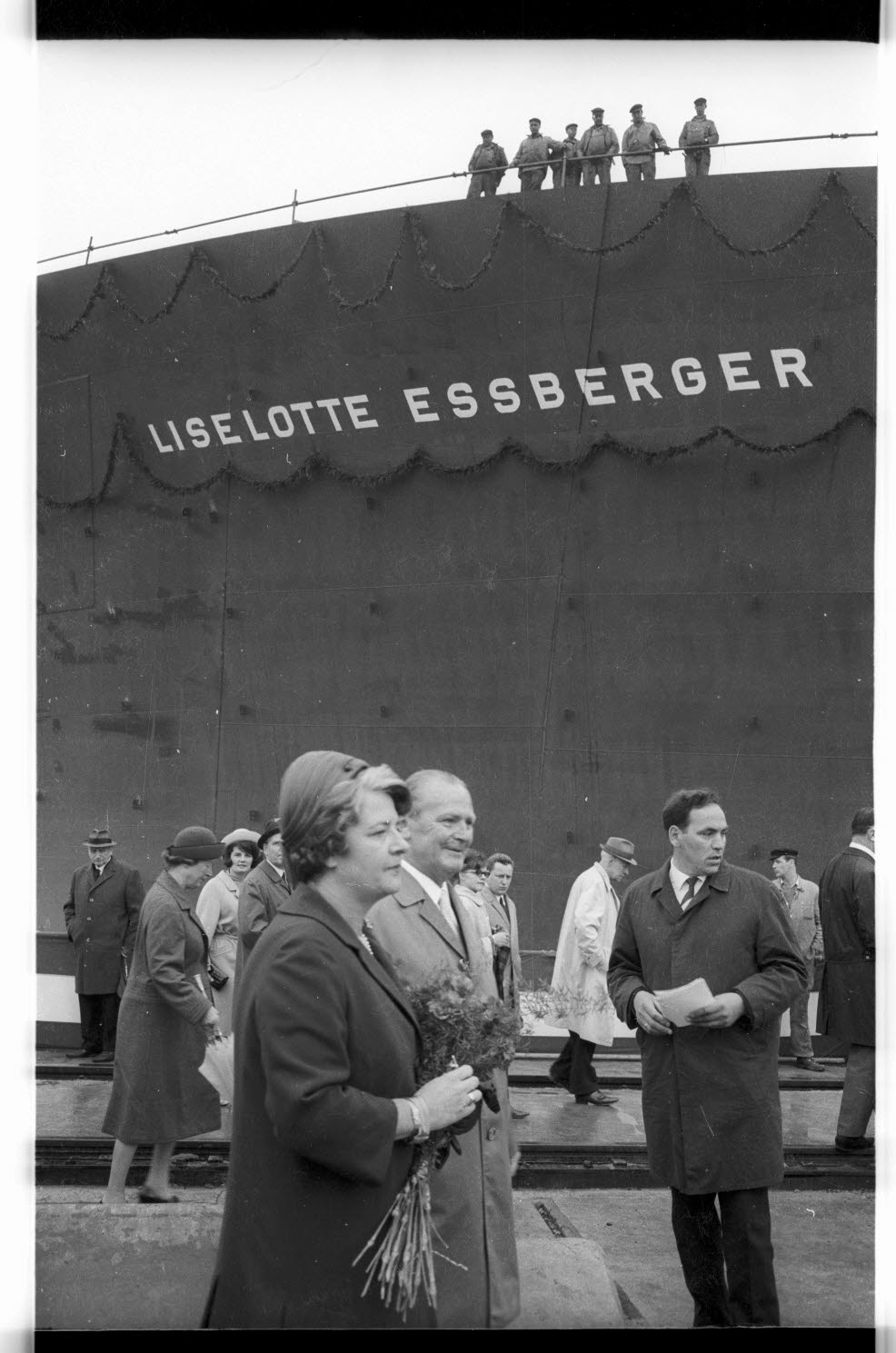 Stapellauf bei den Howaldtswerken für die Reederei John T. Essberger. Im Bild links die Reederin Liselotte von Rantzau-Essberger und HDW-Werftdirektor Adolf Westphal.